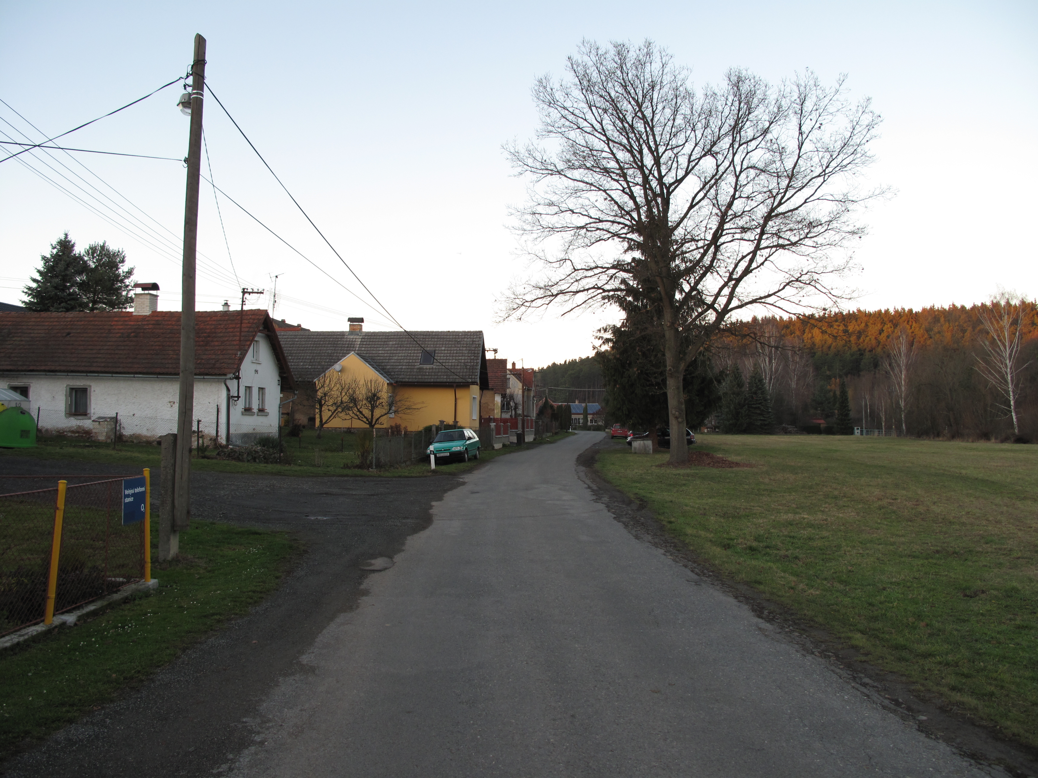 Silnice v Bolkově. Okres Plzeň-jih, Česká republika.